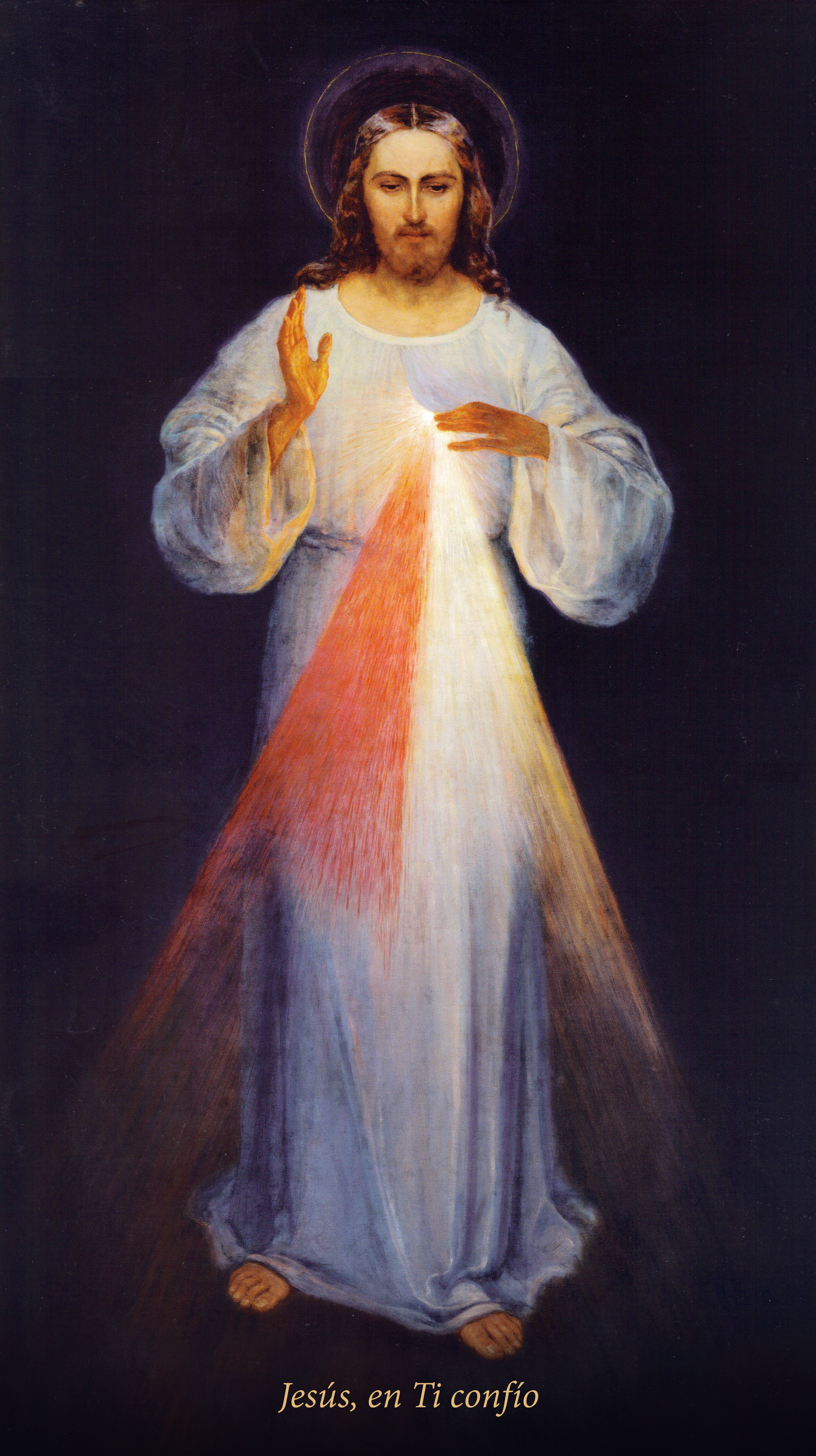 Pintura original de la Divina Misericordia, Pintor Eugeniusz Kazimirowski 1934